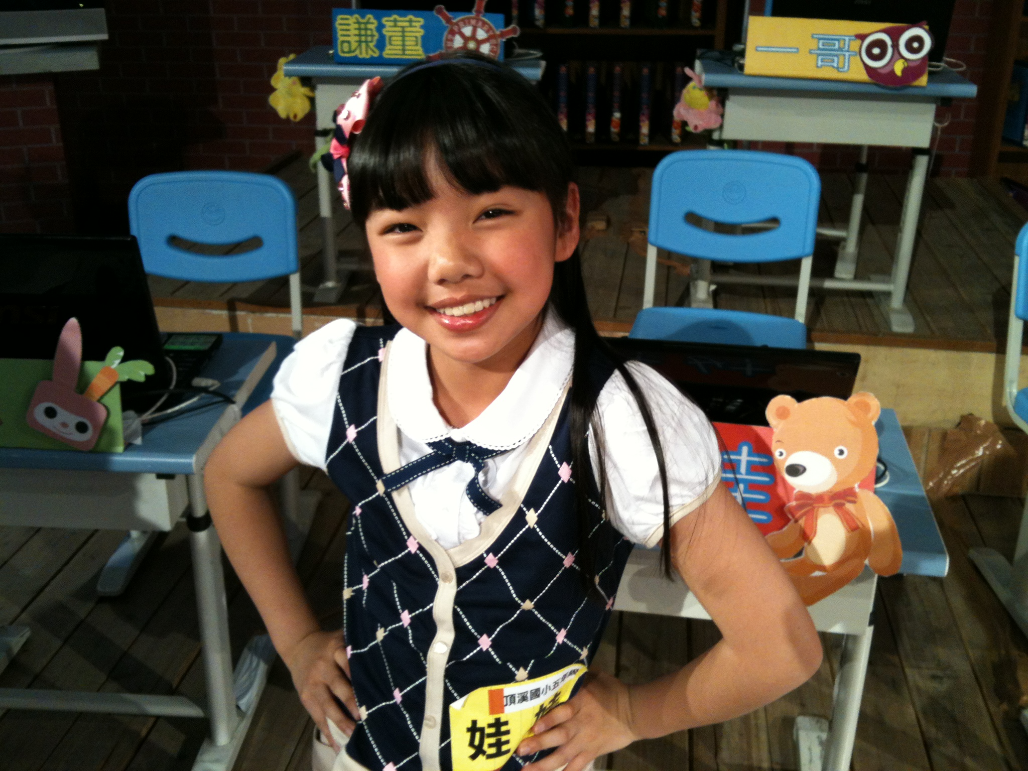 《百萬小學堂》陪考生「娃娃」。